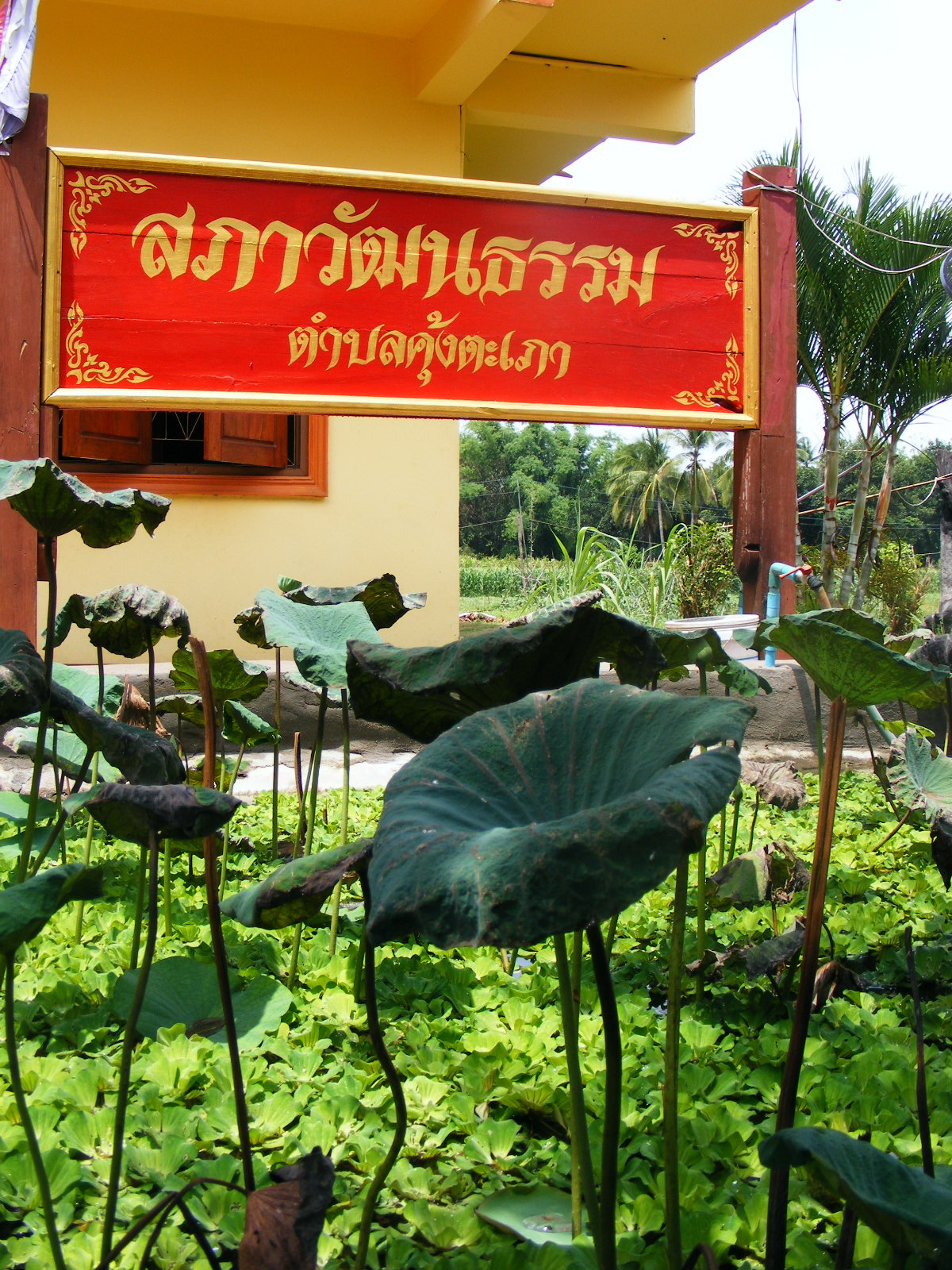 สภาวัฒนธรรม วัดใหม่เจริญธรรม (อุตรดิตถ์) บ้านคุ้งตะเภา ตำบลคุ้งตะเภา อำเภอเมืองอุตรดิตถ์ จังหวัดอุตรดิตถ์.